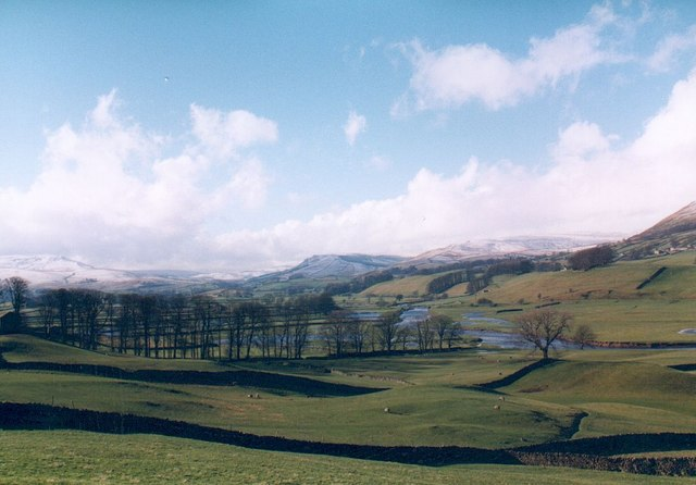 Floods in Wensleydale, below Burtersett